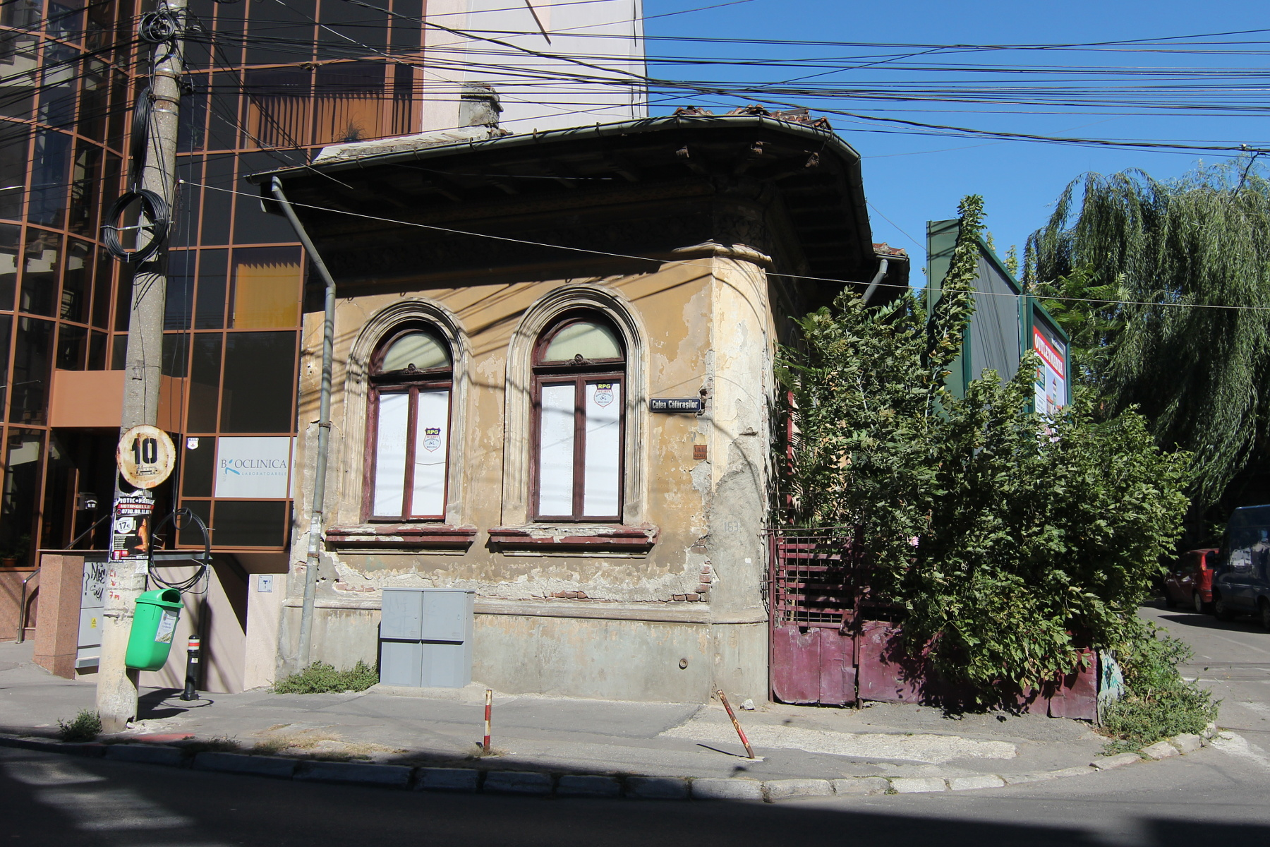 Casă pe Calea Călarașilor